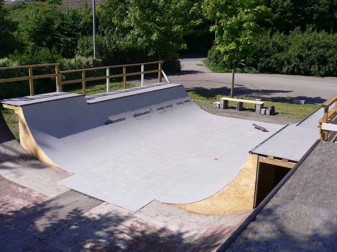 Rampen i Torshovdalen